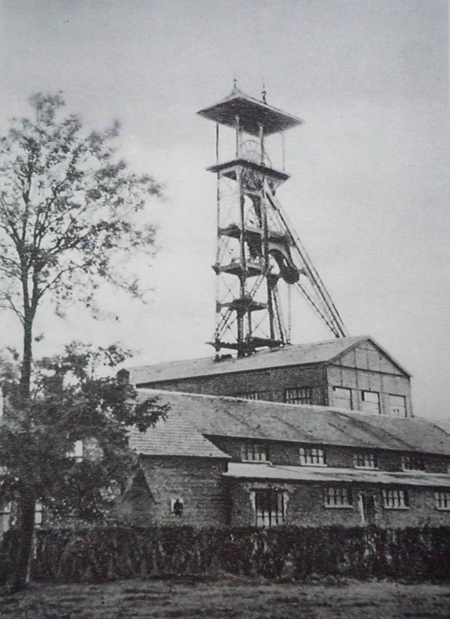 La Fosse n° 3 de la Compagnie des mines de Ligny-lès-Aire était un charbonnage constitué d'un seul puits situé à Auchy-au-Bois, Pas-de-Calais, Nord-Pas-de-Calais, France.